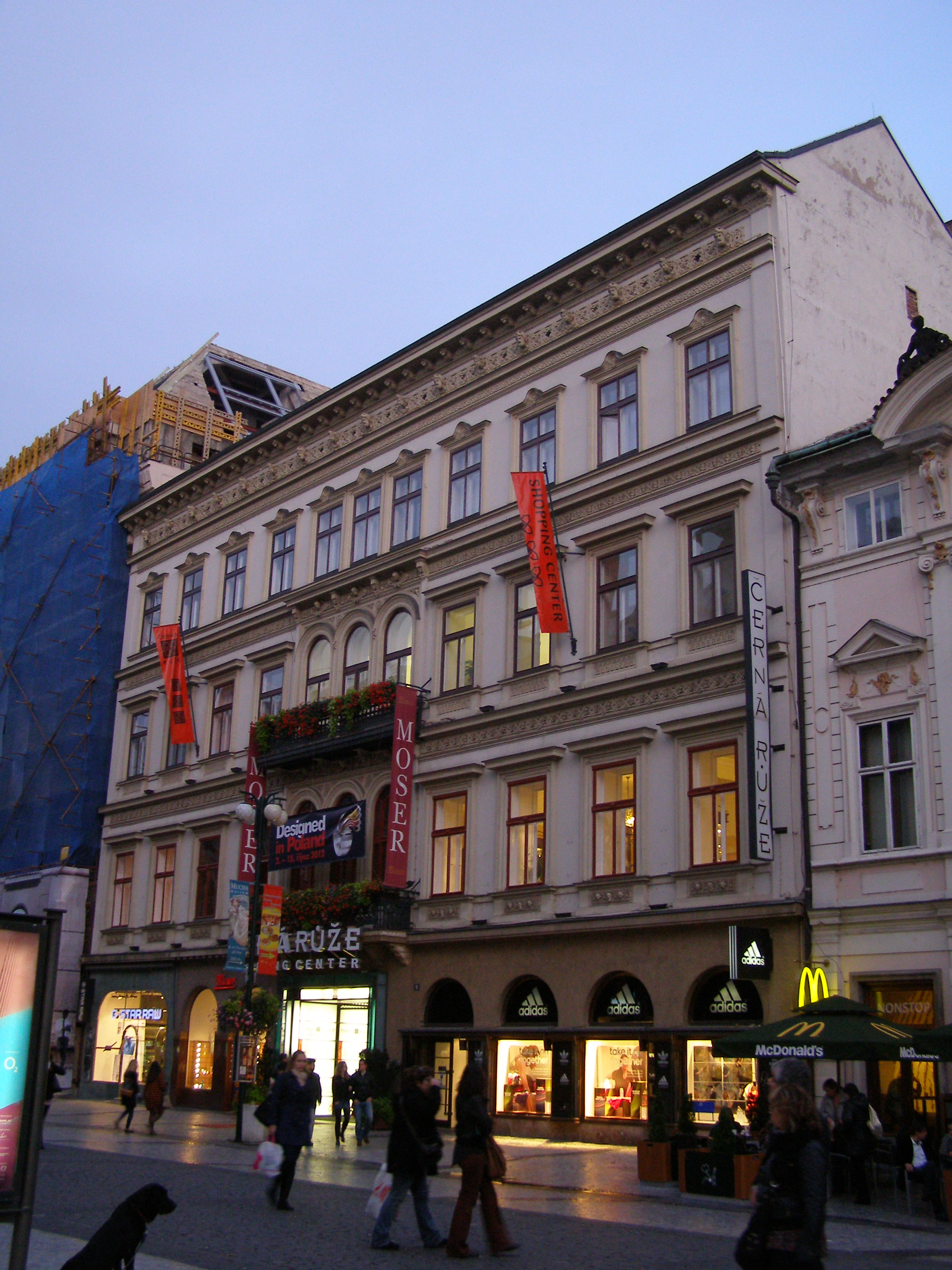 Měšťanský dům U černé růže (Nové Město), Praha 1, Na Příkopě 853, Nové Město